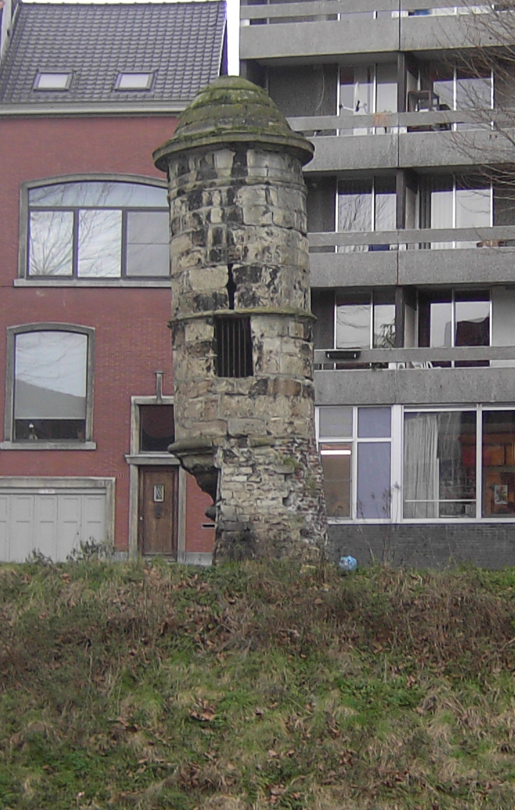 Peperbus in Gent - een deel van de oude omwalling - Ghent - Belgium